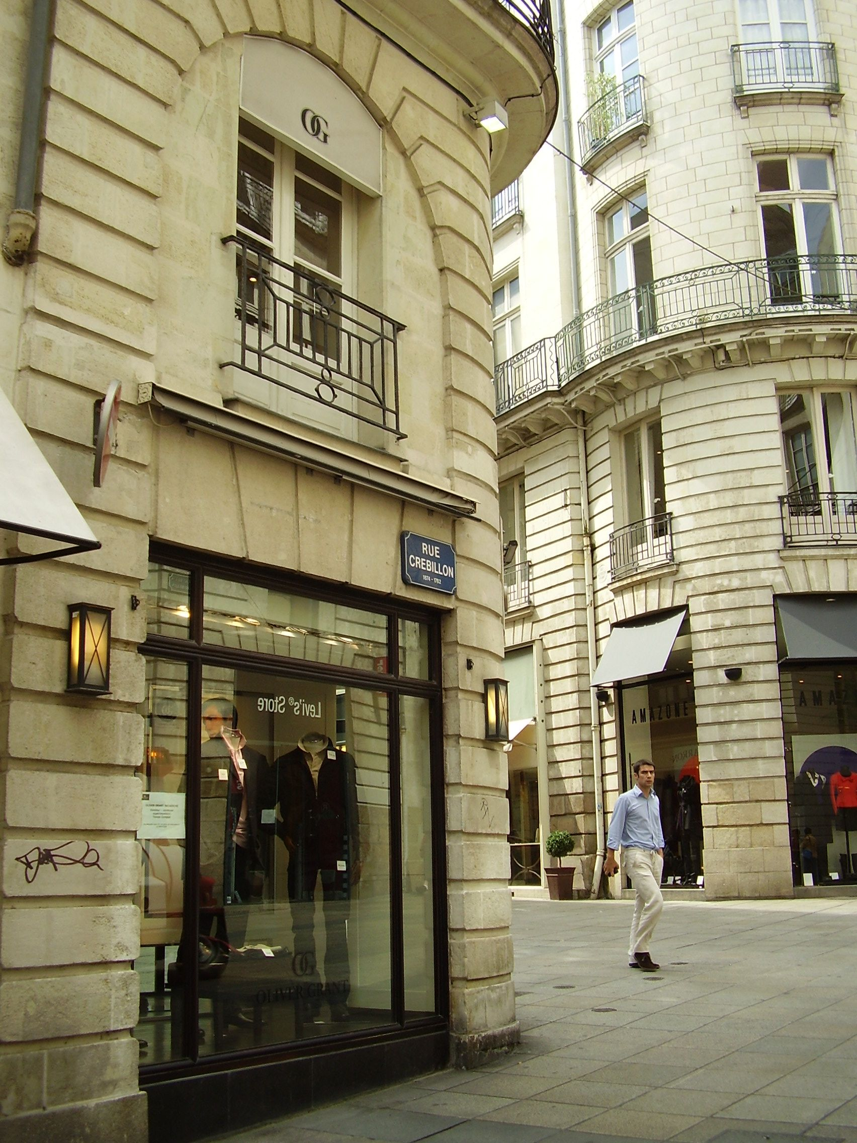 Rue Crébillon, Nantes, France